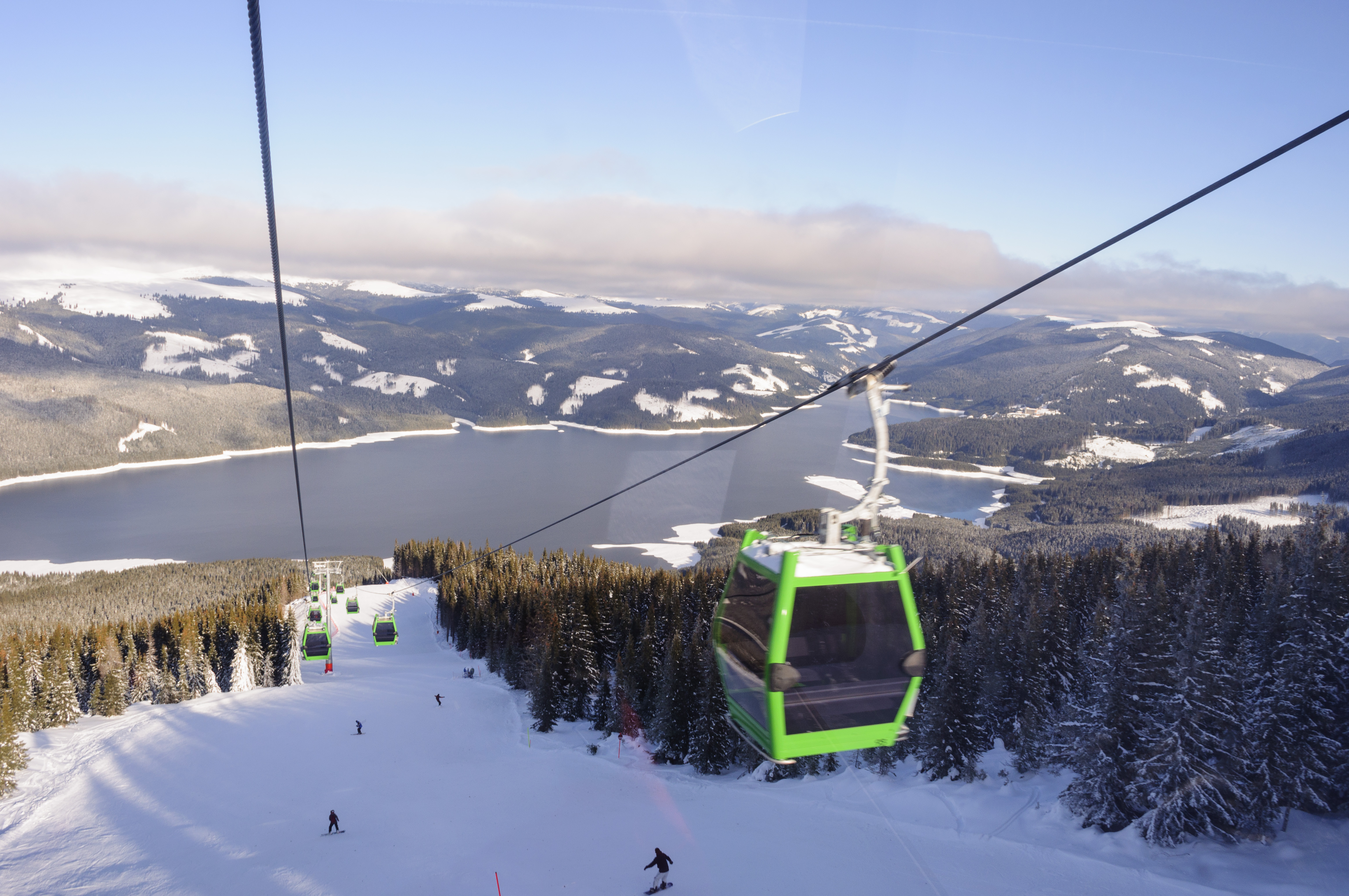 Voineasa, Romania